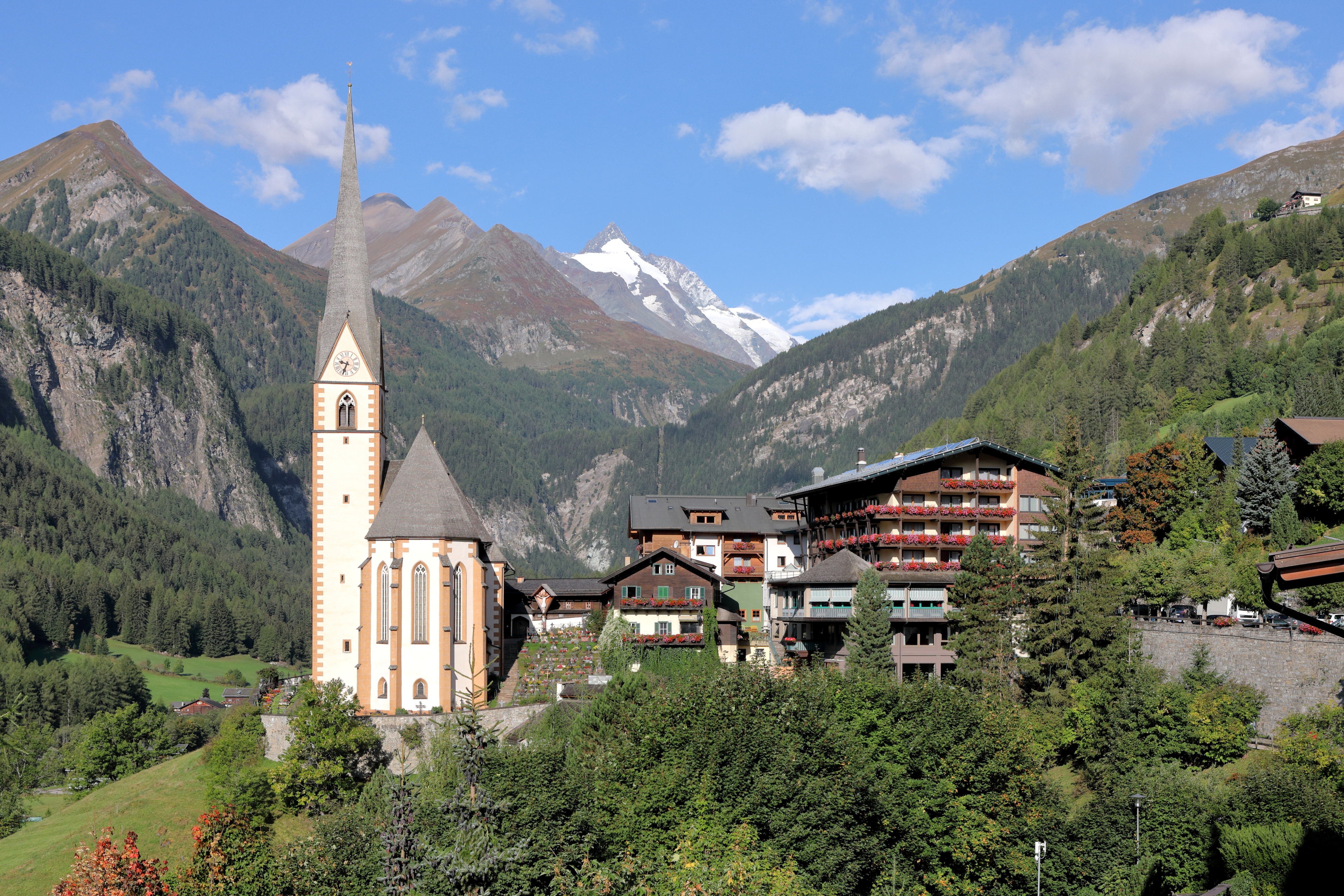 Ostsüdostansicht des Ortszentrums der österreichischen Gemeinde Heiligenblut am Großglockner in Kärnten mit dem Großglockner im Hintergrund.